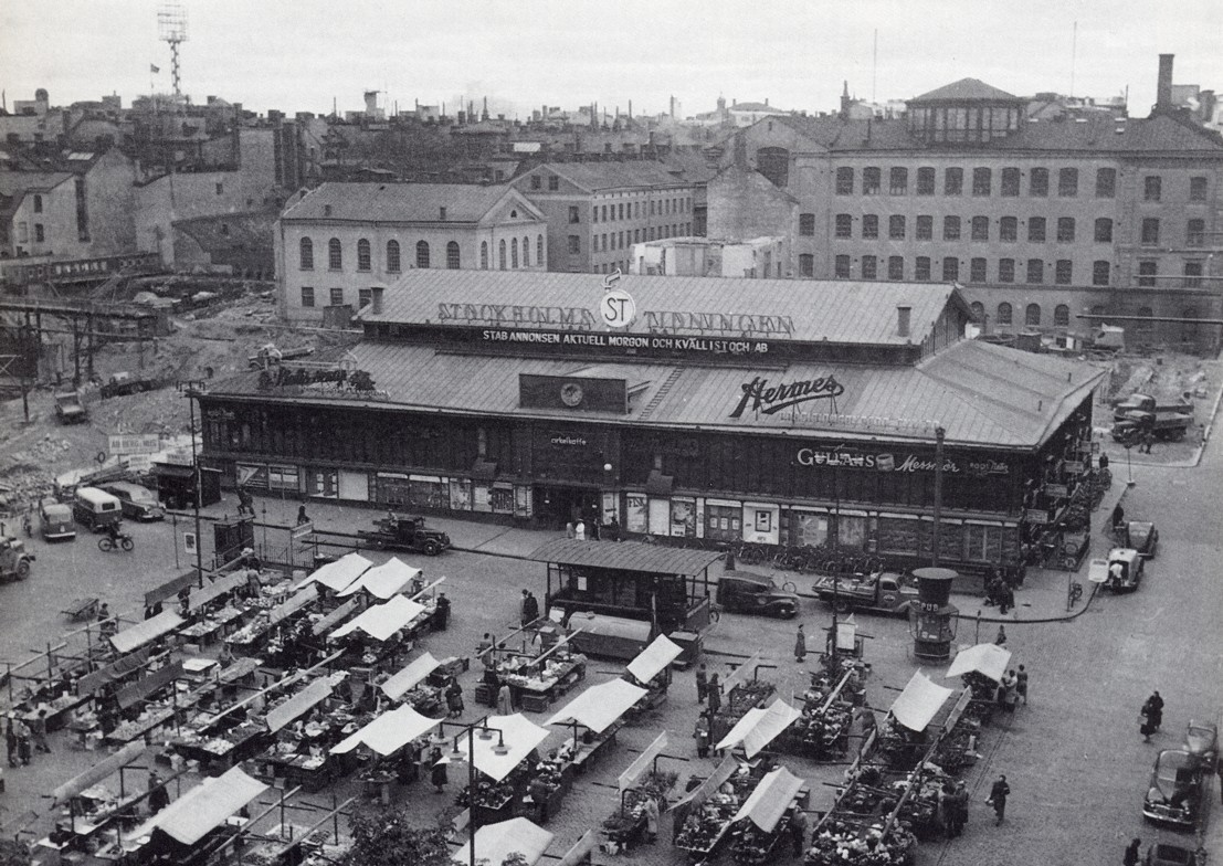 Hötorgshallen i Stockholm 1953. Därbakom Betlehemskyrkan t.v. och Konstfack t.h.